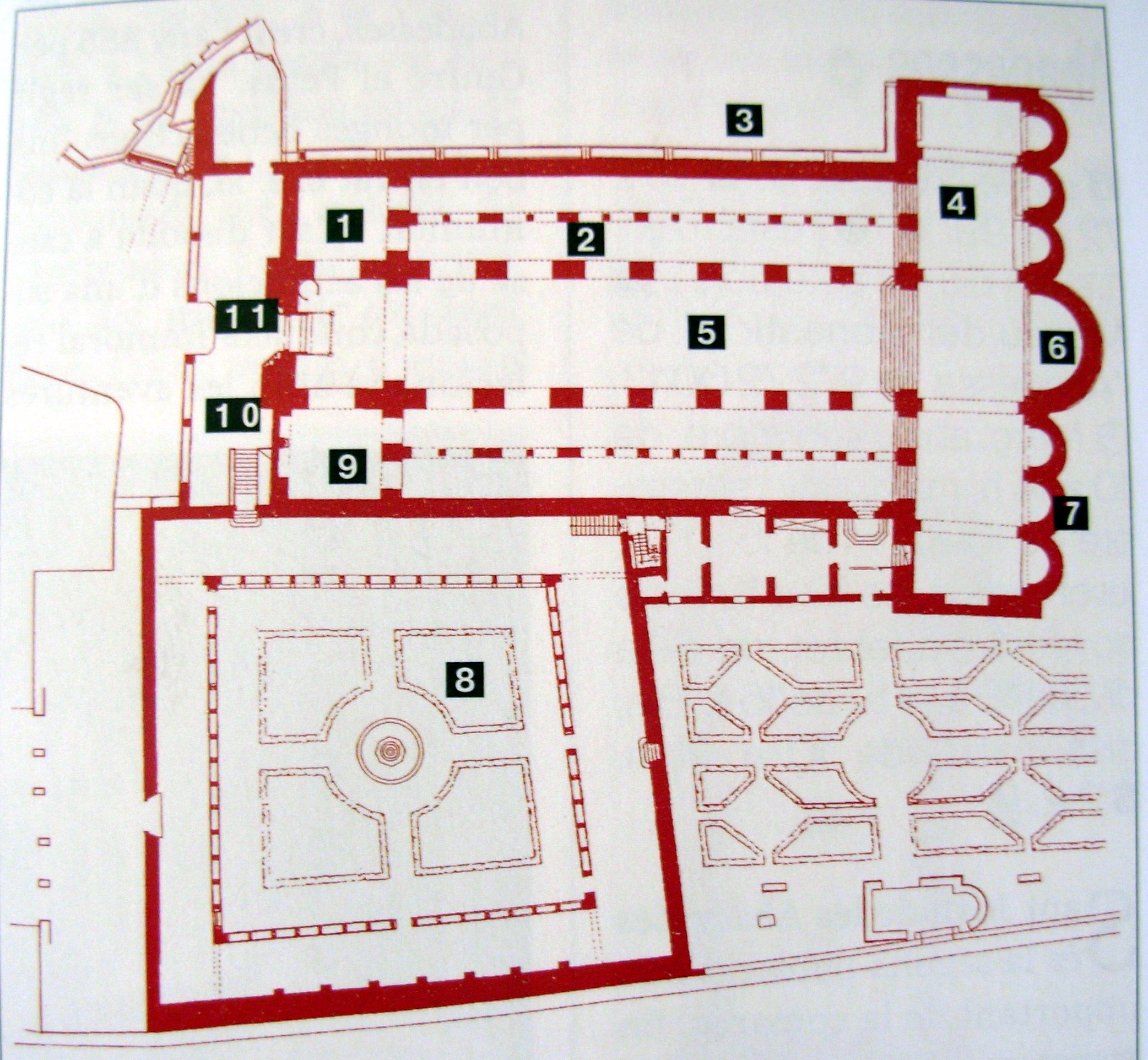 Planta del monestir de Santa Maria de Ripoll (Ripoll, Barcelona, Espanya) ~880 Layout from monestry of Santa Maria de Ripoll (Ripoll, Barcelona, Spain) art romànic - románic - romanesque monestir - monasterio - monestry